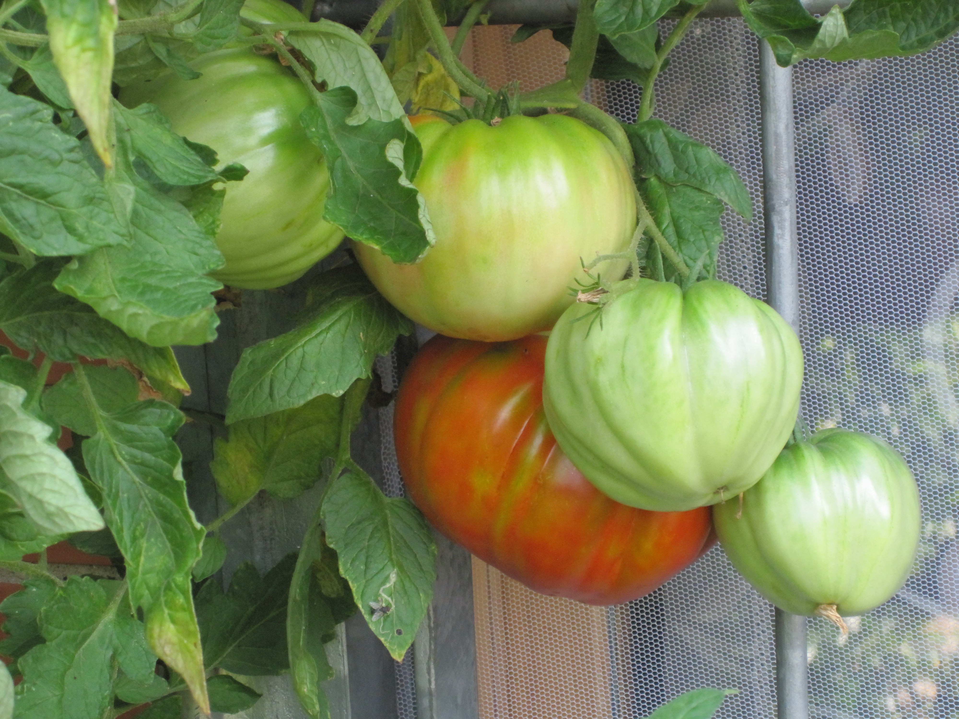 I frutti del solanum lycopersicum - Pomodori in maturazione